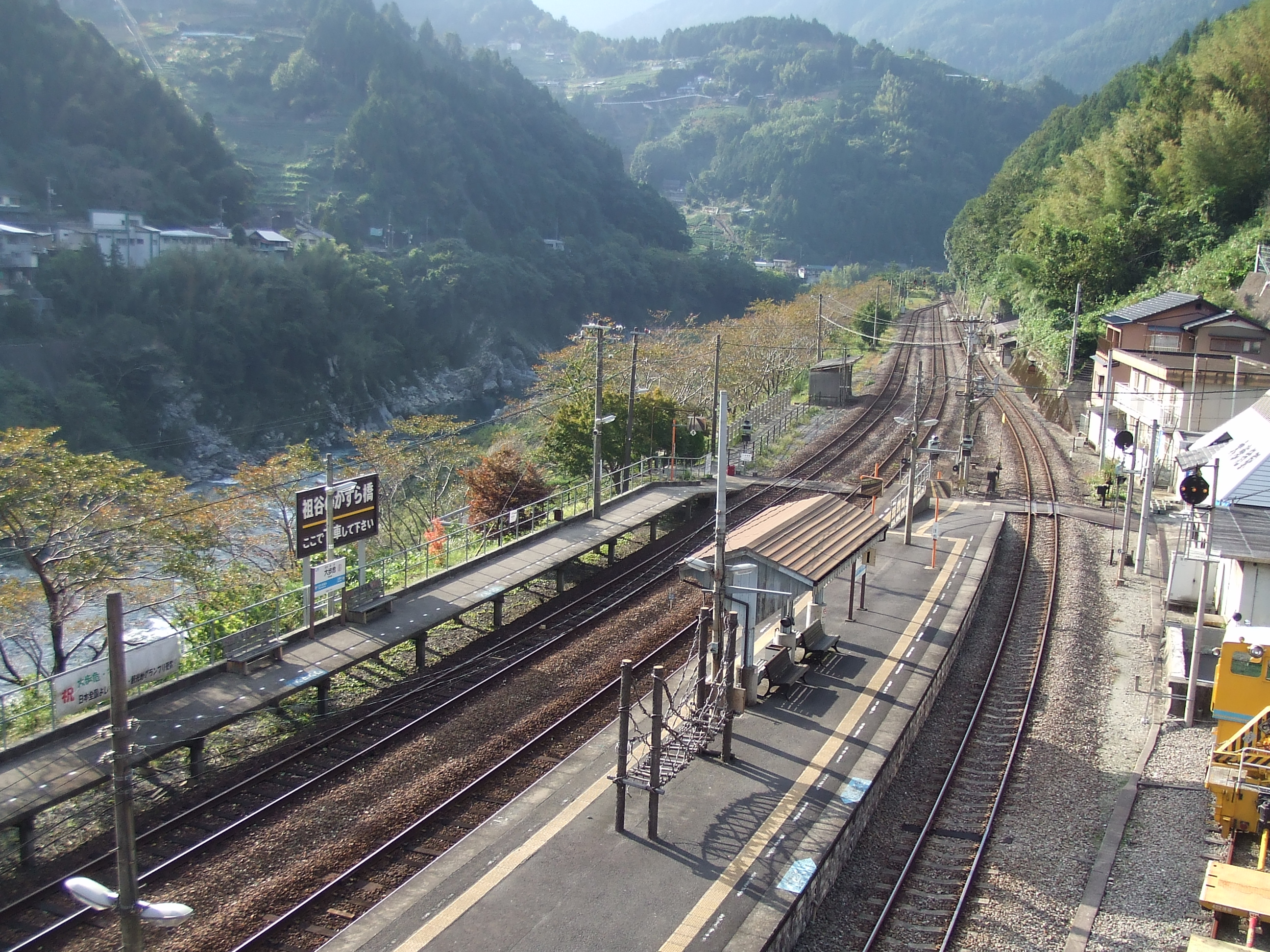 大歩危駅 ホームの様子